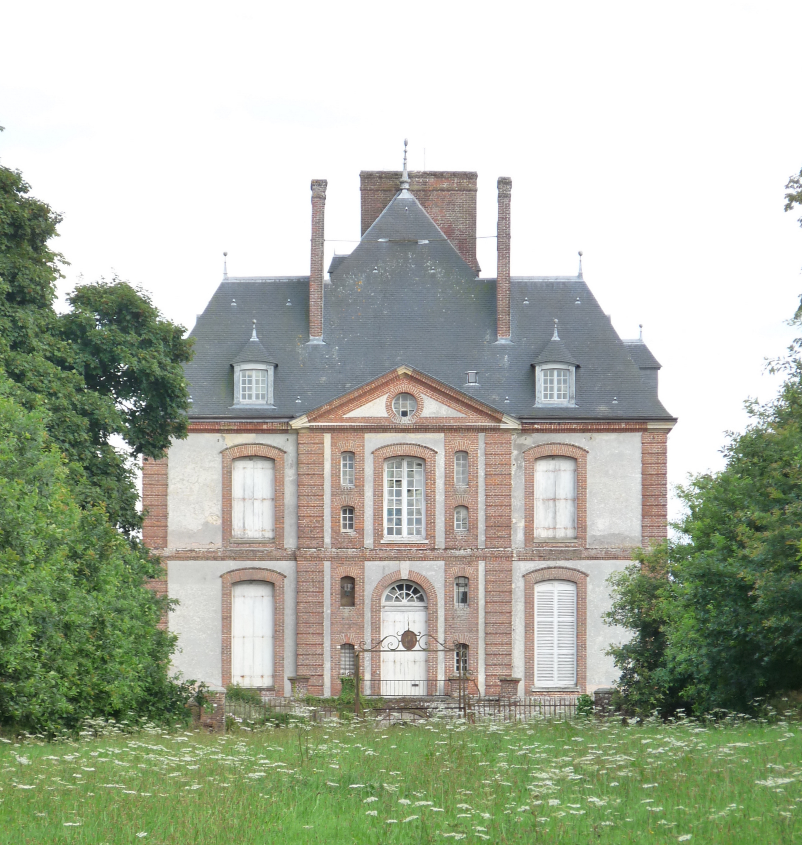 Château de Saint-Victor